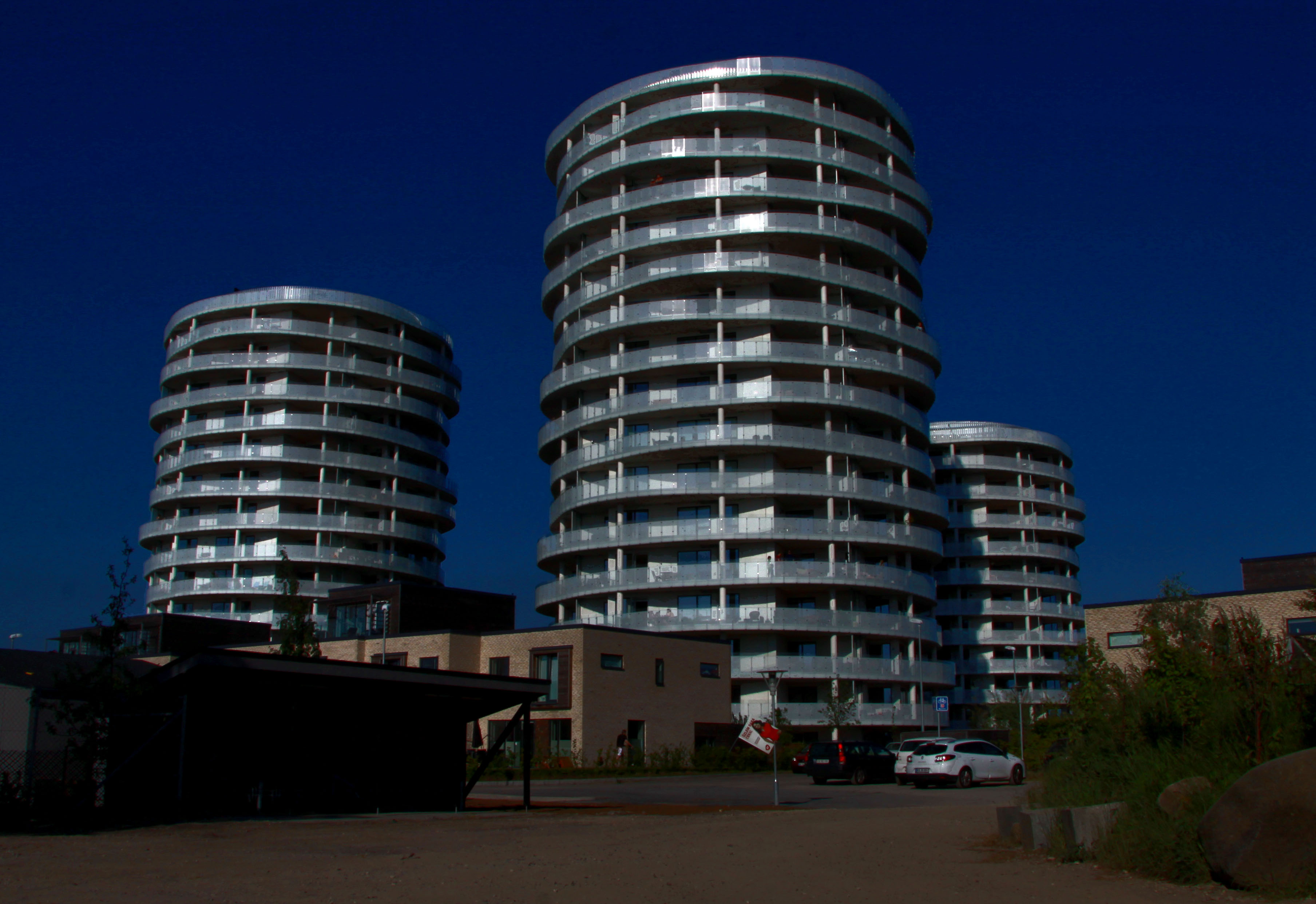 København / Copenhagen. På vejen mellem Slusen og Islands Brygge.